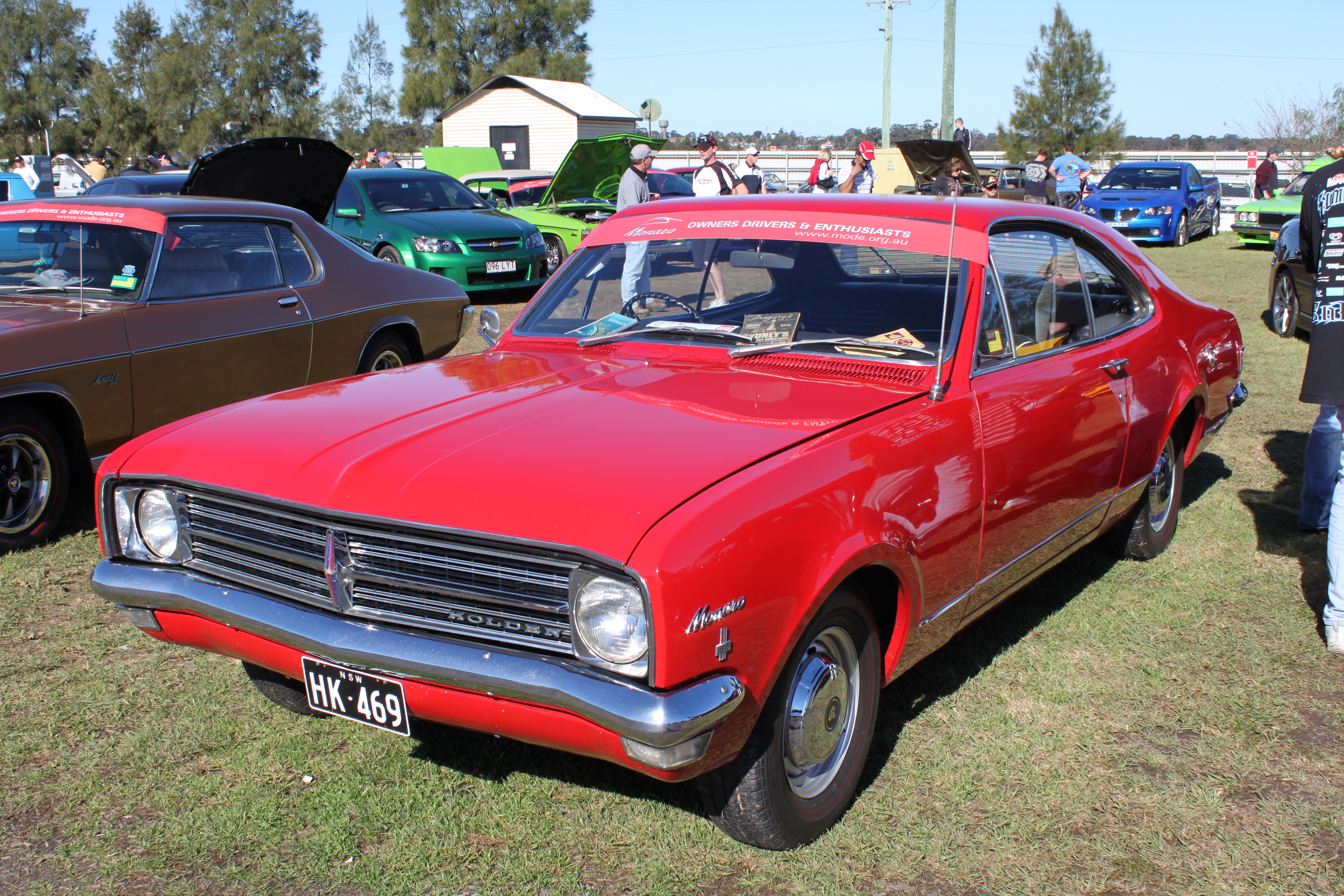 Holden Monaro HK